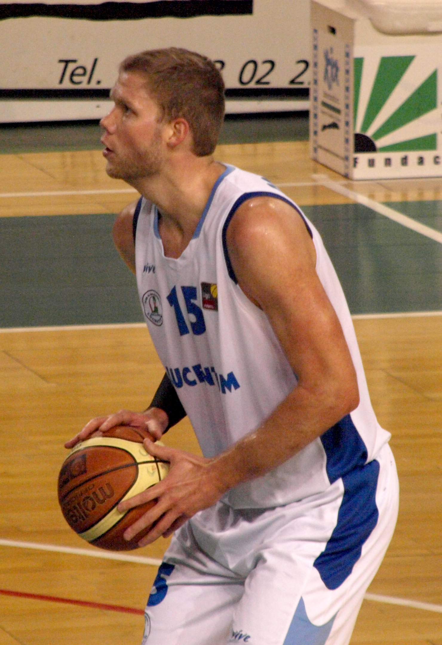 El jugador estadounidense de baloncesto Taylor Coppenrath en un partido con su club, el Lucentum Alicante, en enero de 2013